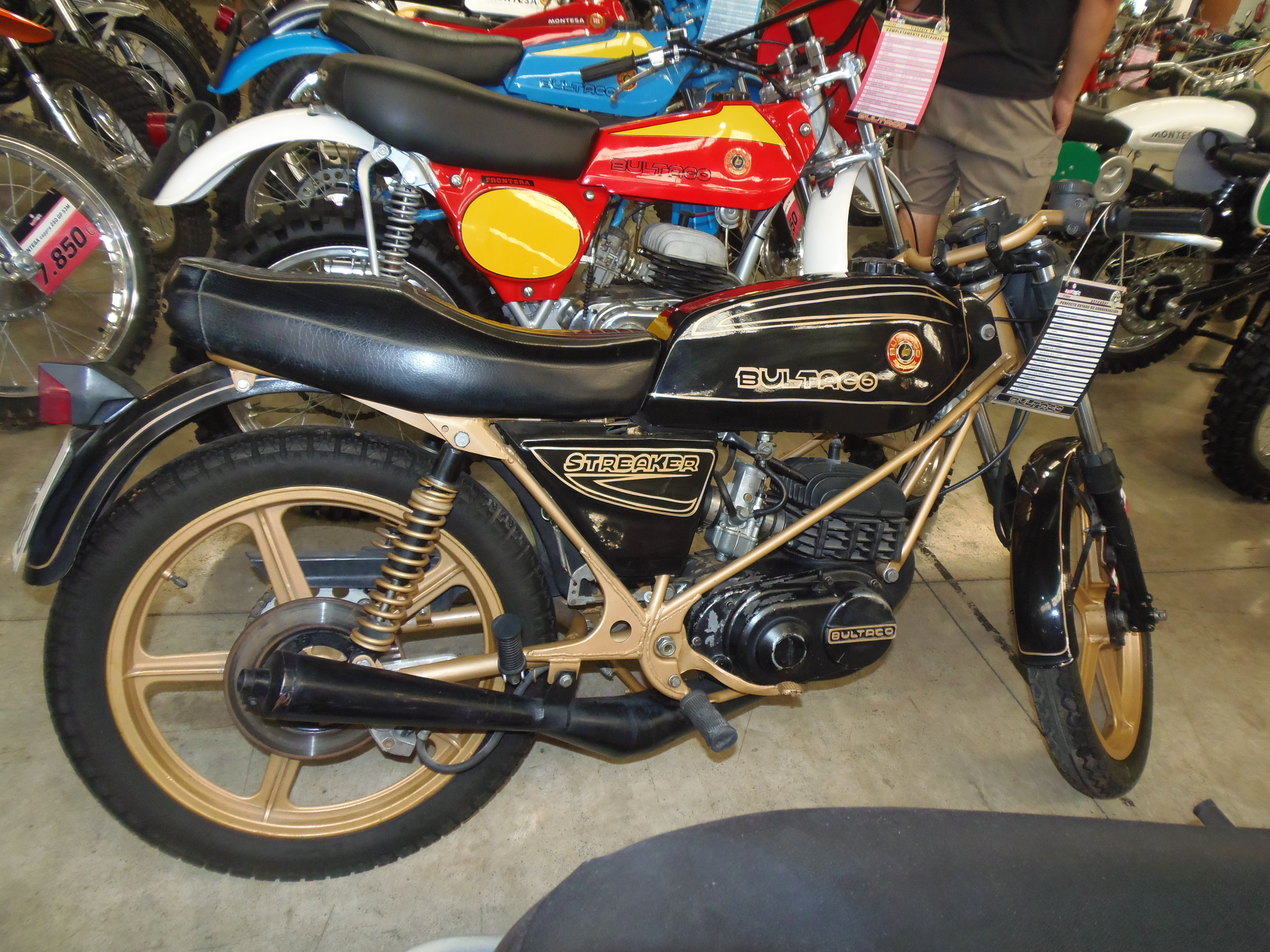 Bultaco Streaker 125, 1978